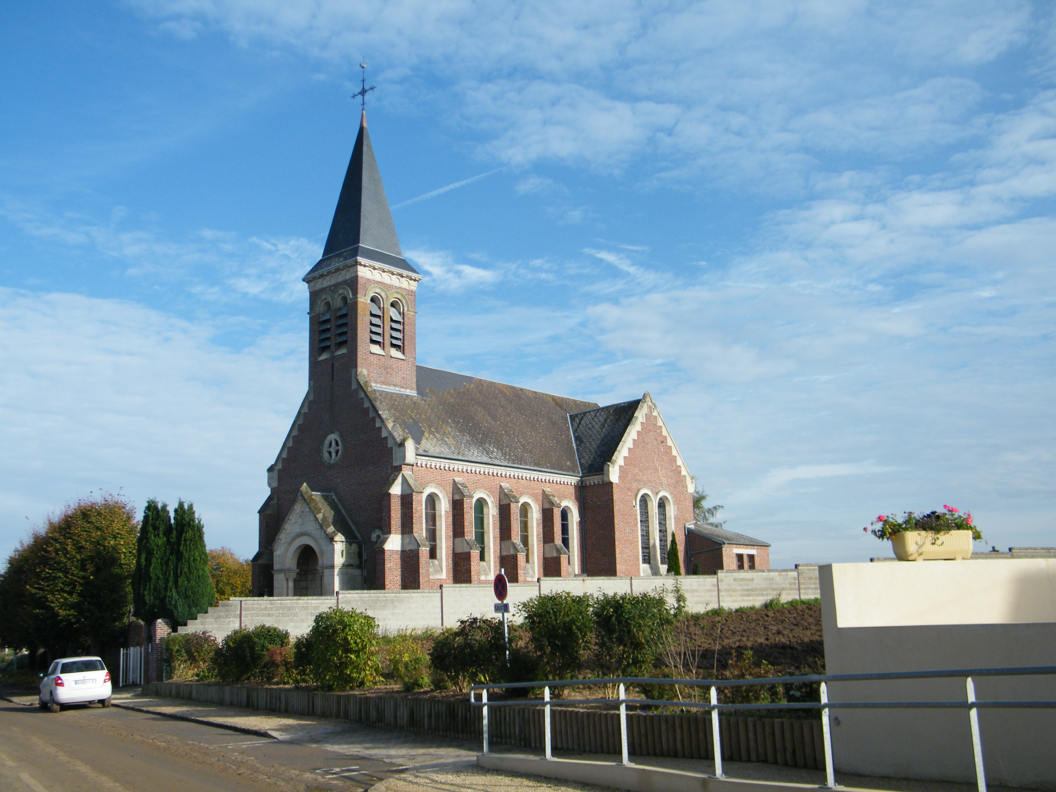 église.